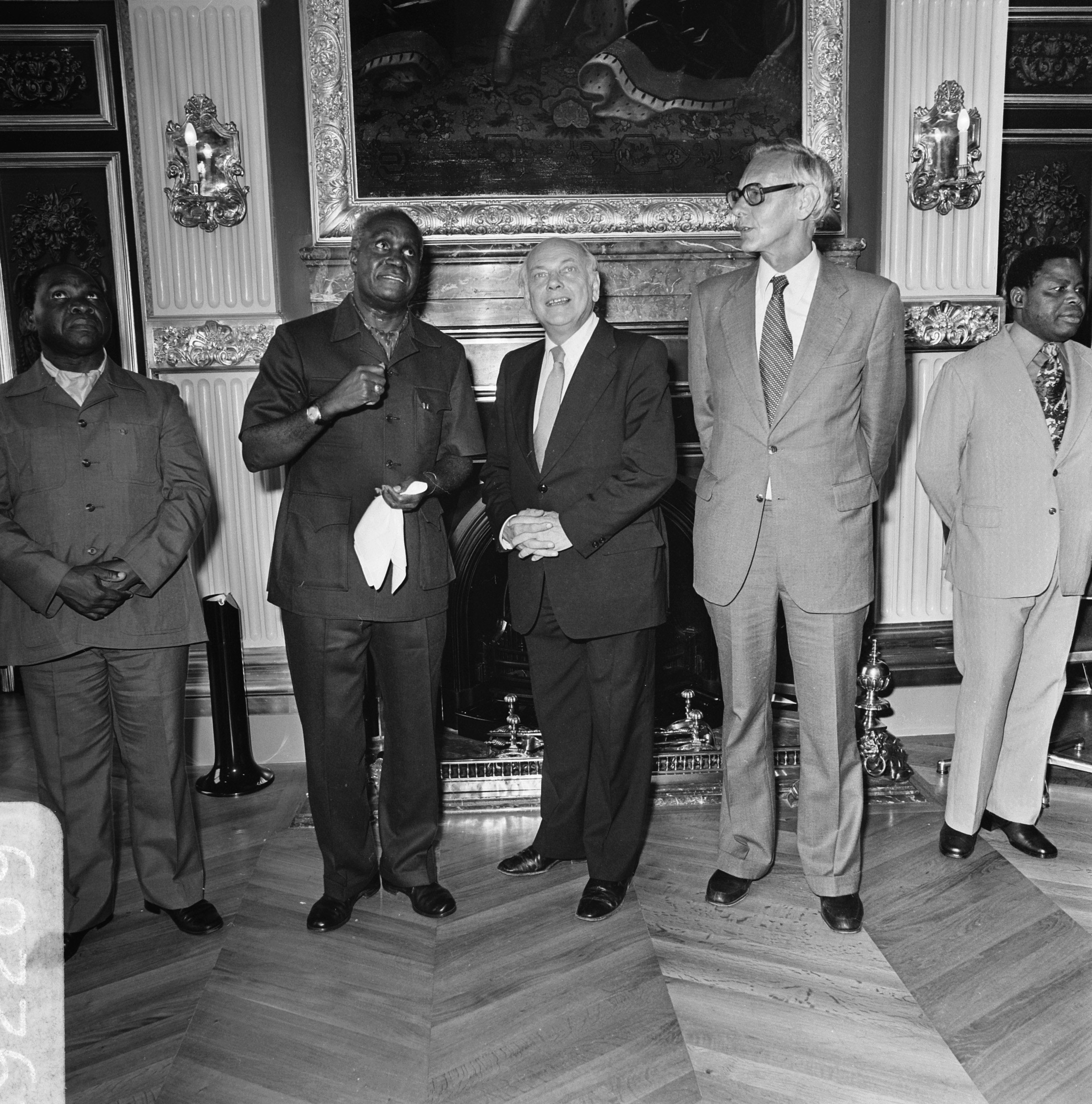 Collectie / Archief : Fotocollectie Anefo Reportage / Serie : [ onbekend ] Beschrijving : President Kaunda van Zambia in ons land; v.l.n.r. Kaunda Den Uyl , Van der Stoel Datum : 13 juni 1977 Locatie : Zambia Trefwoorden : presidenten Persoonsnaam : Kaunda, Kaunda, Kenneth, Uyl, Joop den Fotograaf : Croes, Rob C. / Anefo Auteursrechthebbende : Nationaal Archief Materiaalsoort : Negatief (zwart/wit) Nummer archiefinventaris : bekijk toegang 2.24.01.03 Bestanddeelnummer : 929-2269